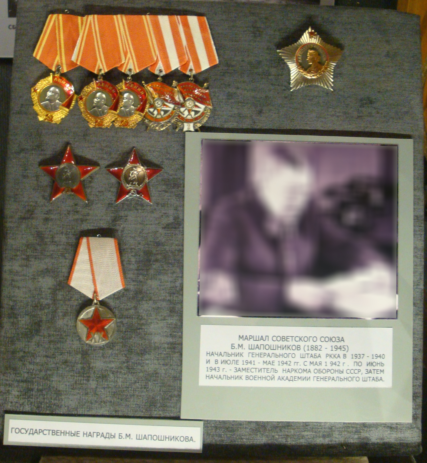 Награды маршала Шапошникова